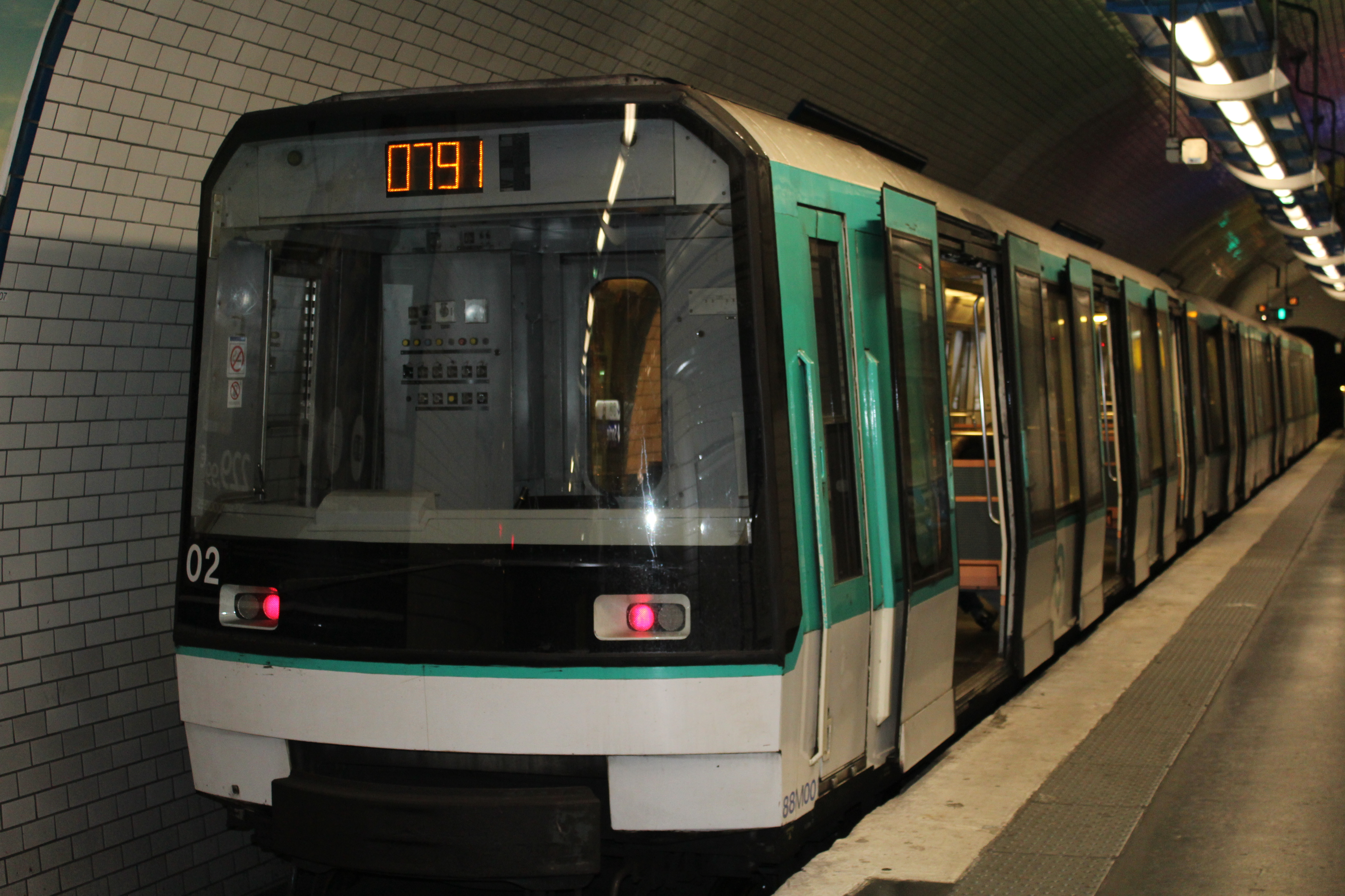 Rame de métro dans la station Pré Saint-Gervais, Paris.